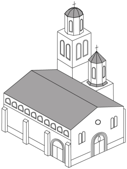 Iglesia de San Jorge (Tudela), desaparecida; reconstrucción del edificio para el siglo XVIII.